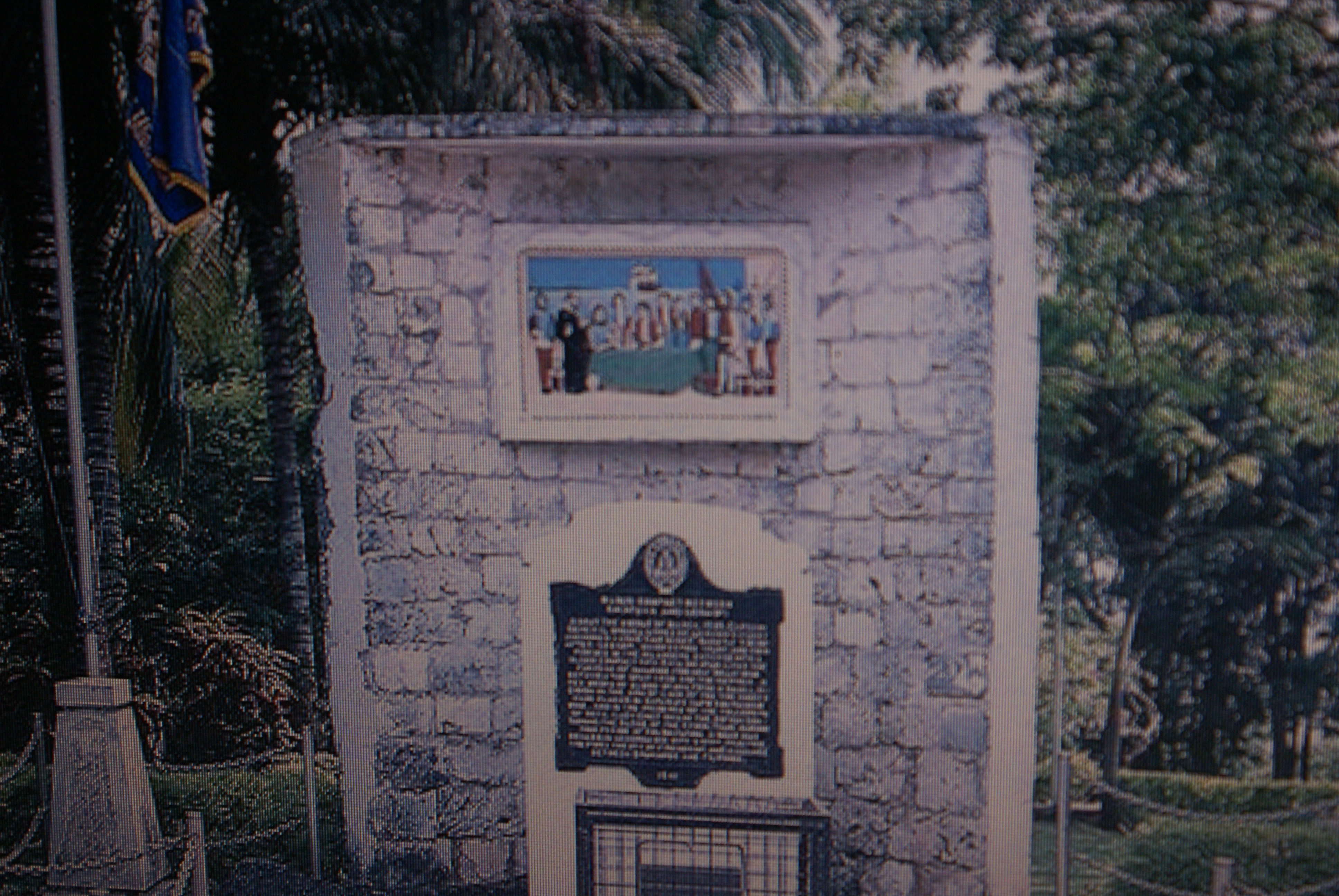 Sandugo Marker